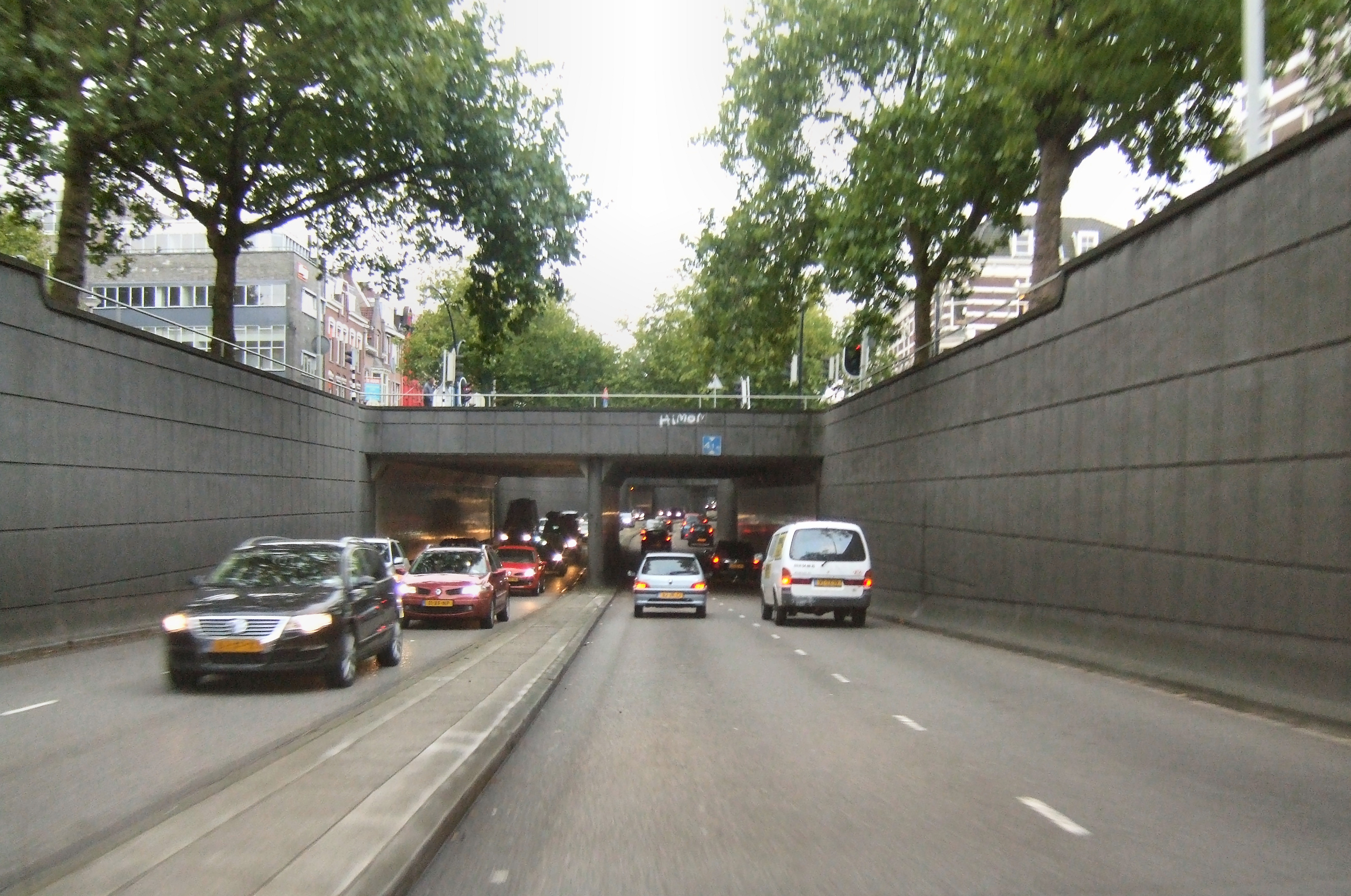 Tunneltraverse - kruising met Mathenesserlaan